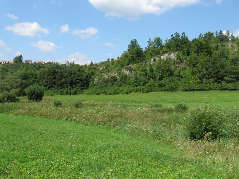 Krasovské údolí - propadání Krasovského potoka za Balcarkou